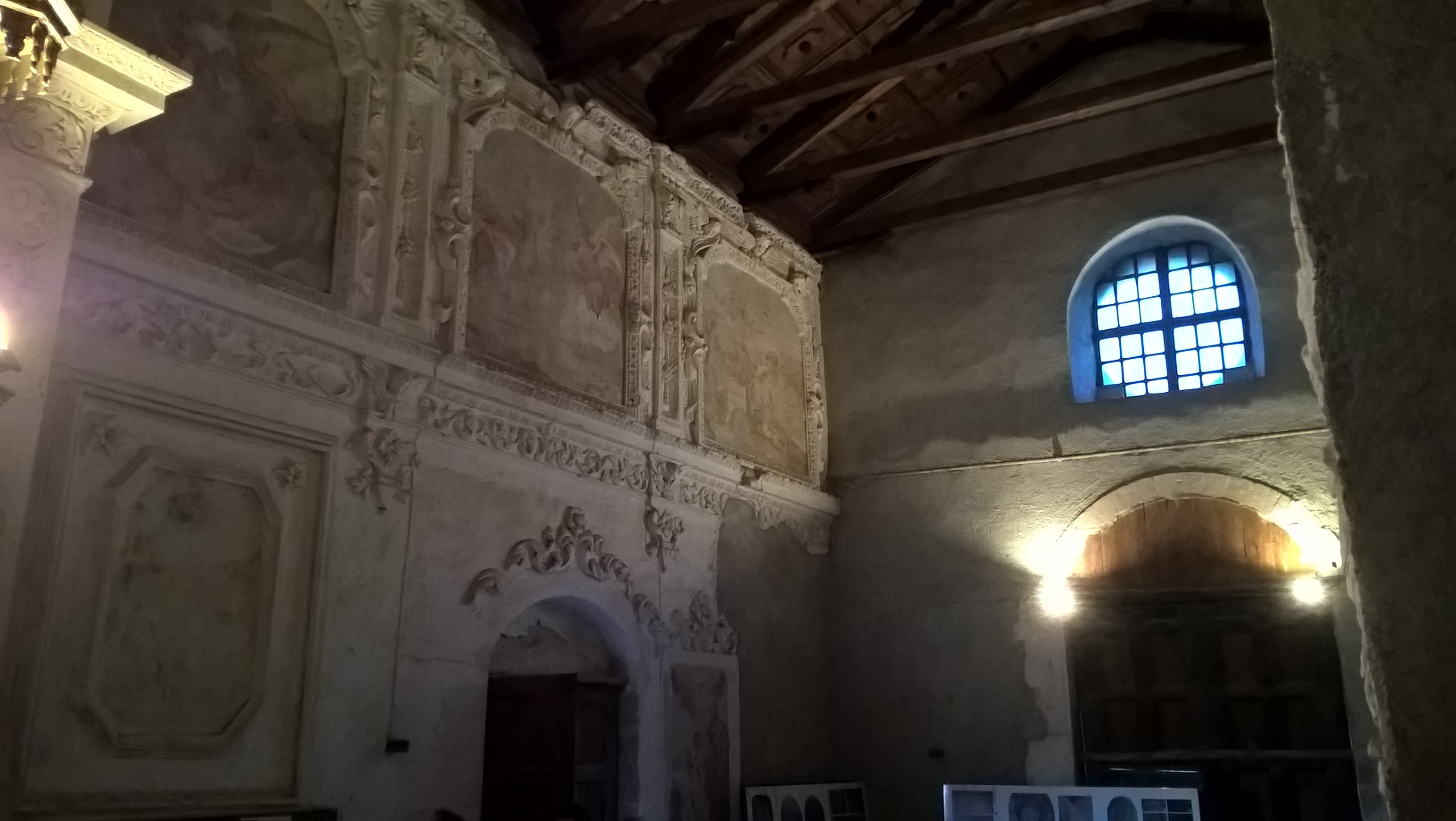 Affreschi del 1701 e controfacciata